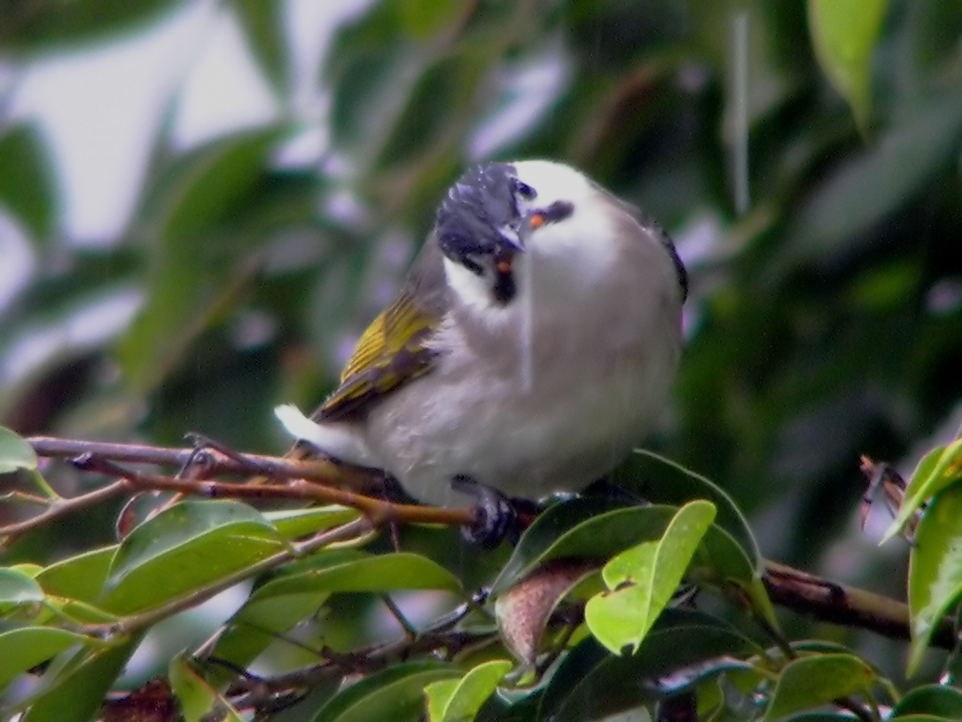 Styan's Bulbul - Pycnonotus taivanusRainy Day